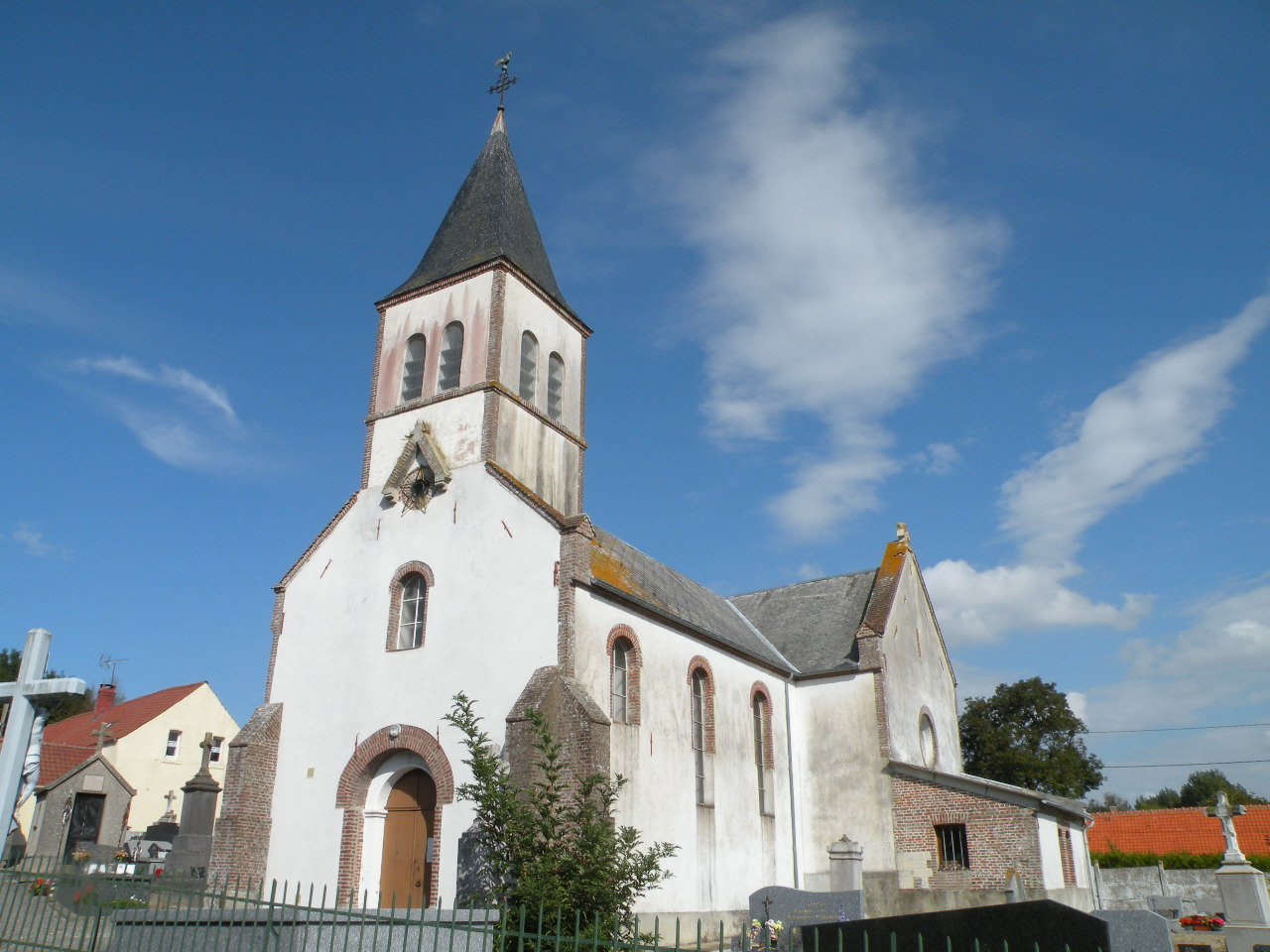 Église d'Airon-Notre-Dame